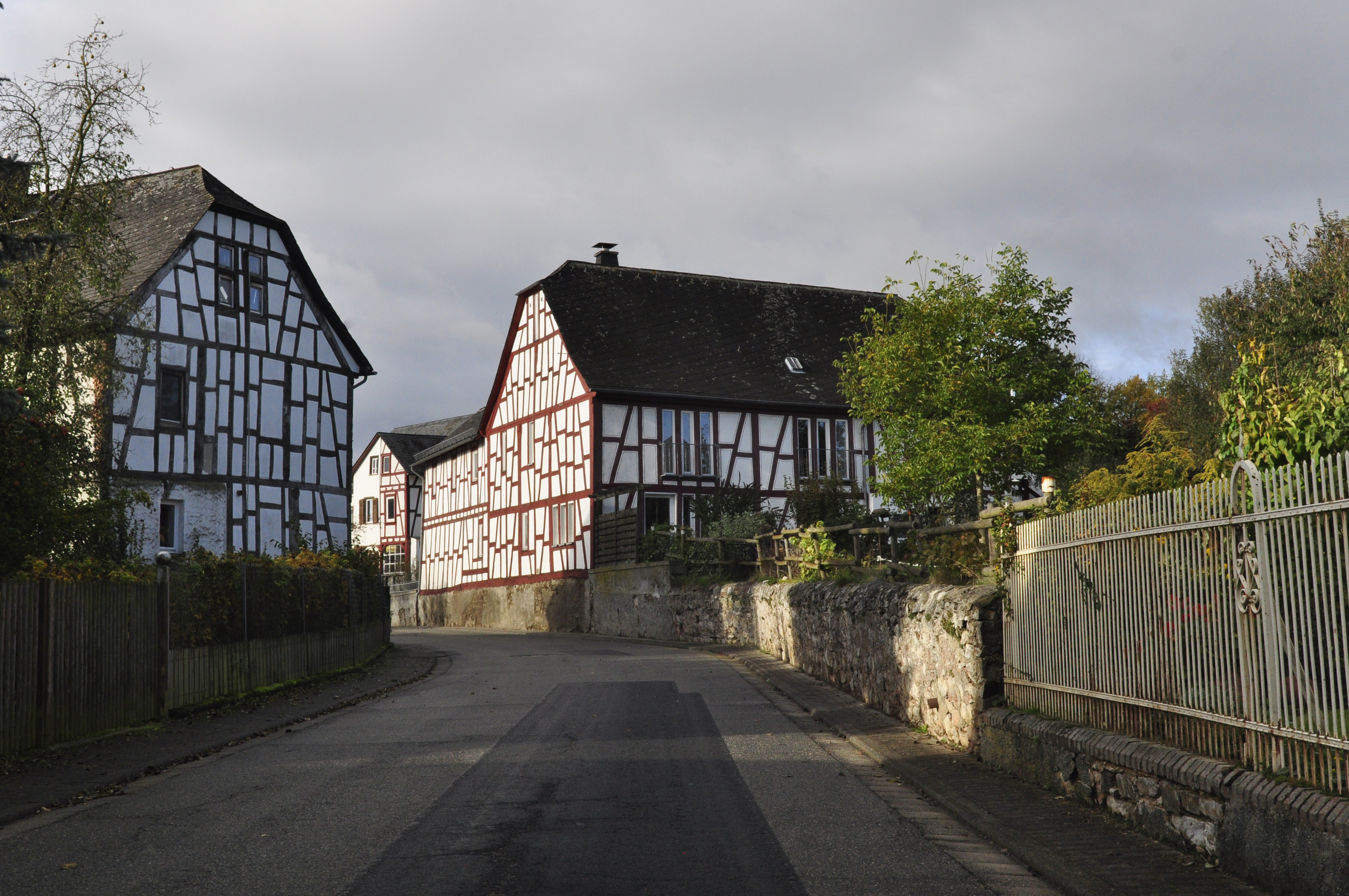 Unterdorfstraße 5–9 und 10–18